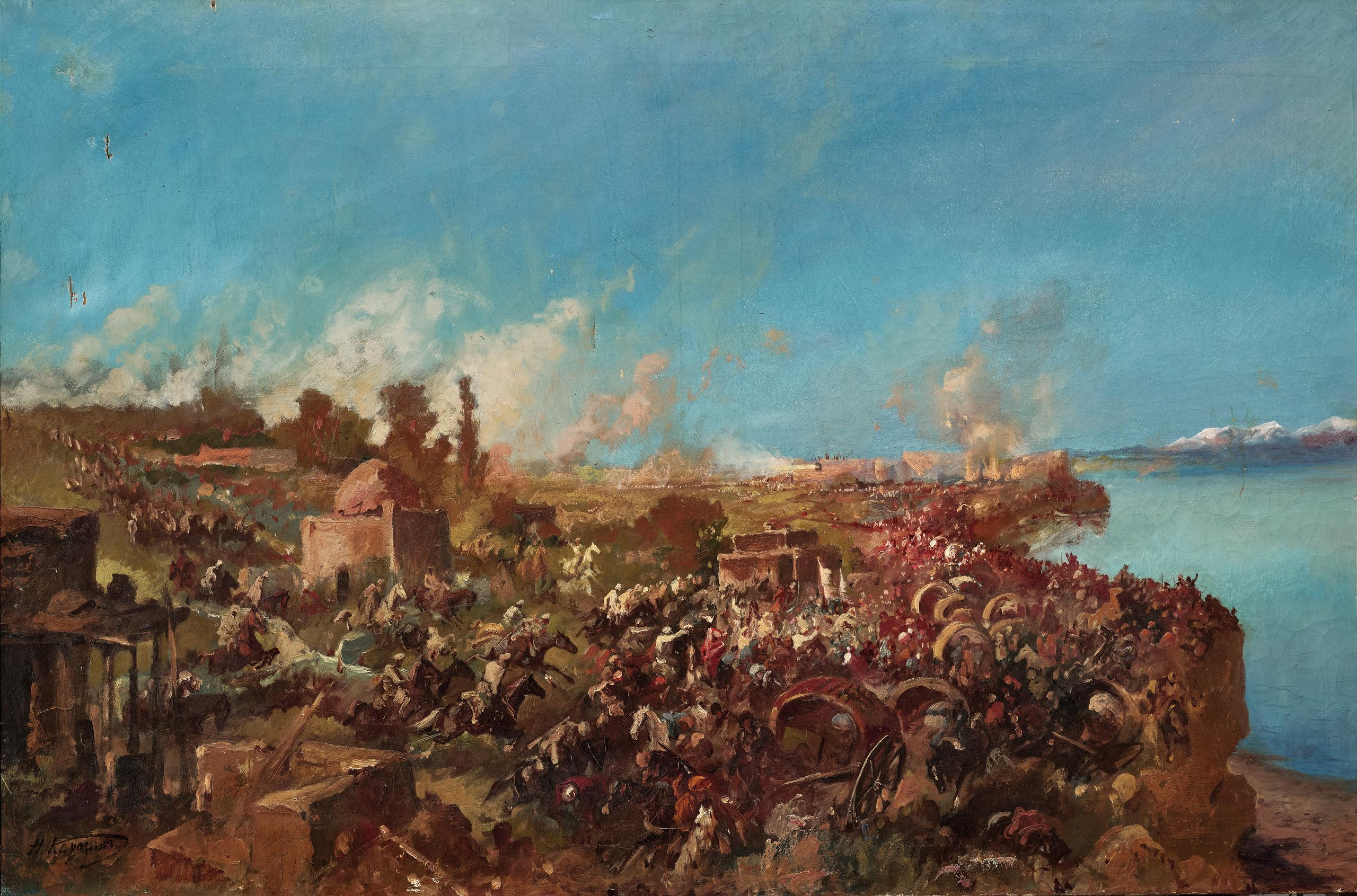 Битва русских и кокандцев при Махраме 1876 год.